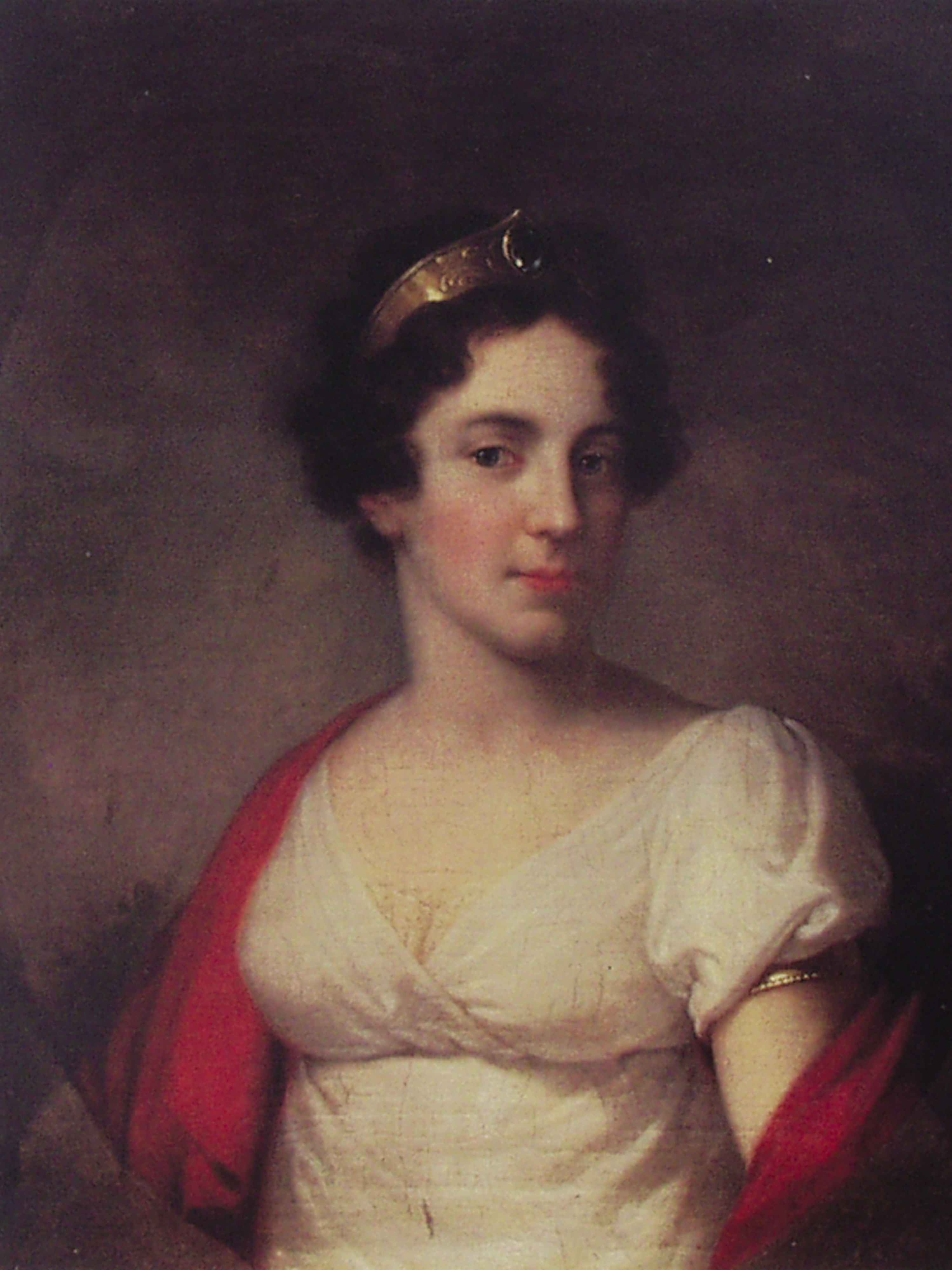 Анеля Санґушкова (†1825)